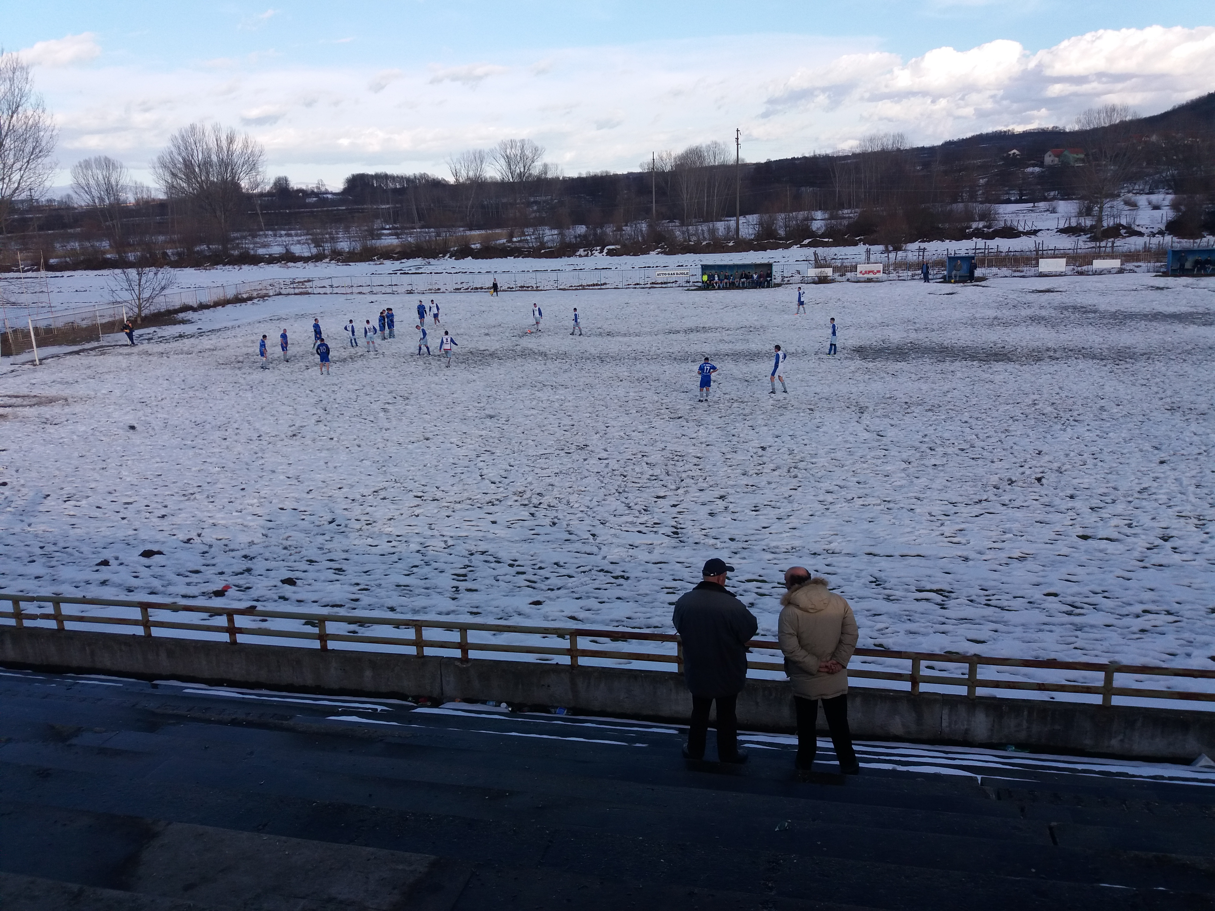 Srpski (latinica): Stadion FK Vučje